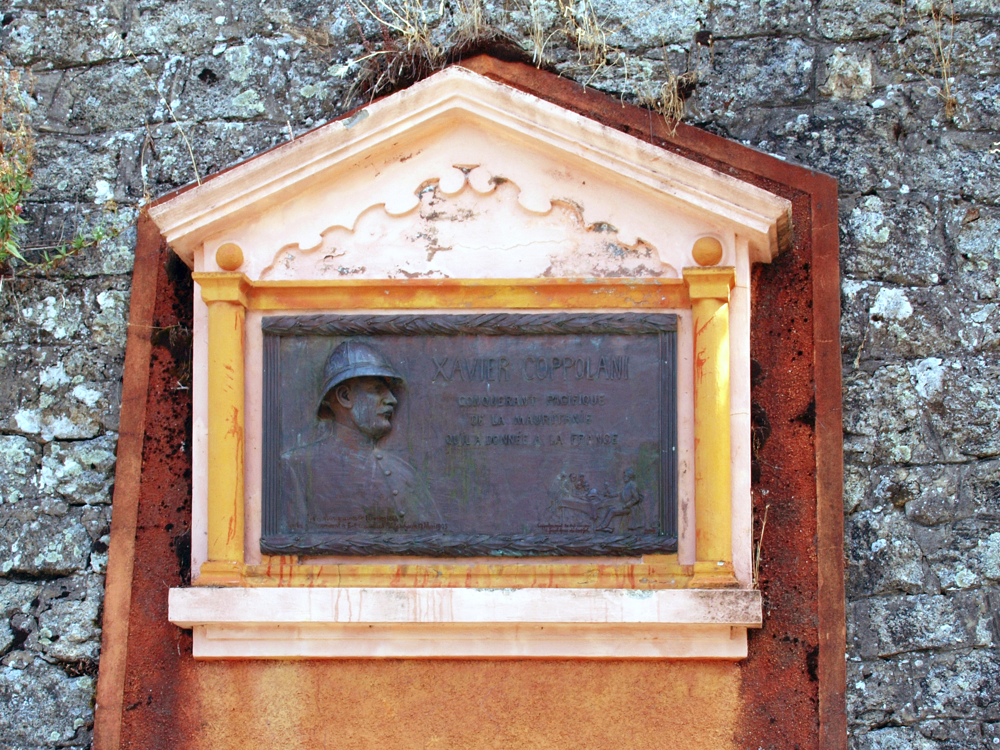 Marignana (Corse) - Mémorial Xavier Coppolani à a Pughjola